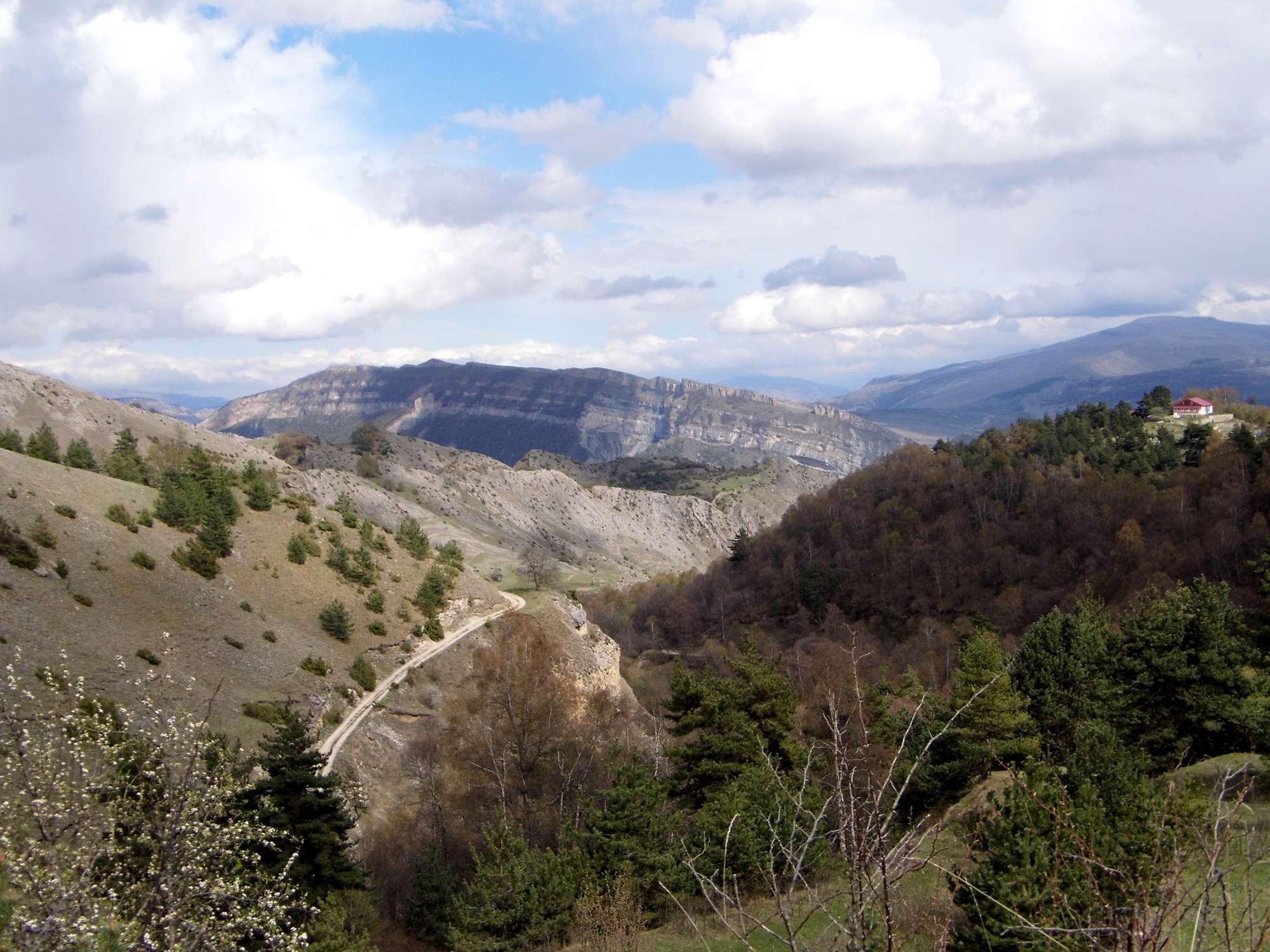 Горный ботанический сад 'Гунибское плато', Гунибский район This image is related to the protected area of Russia number 0500009